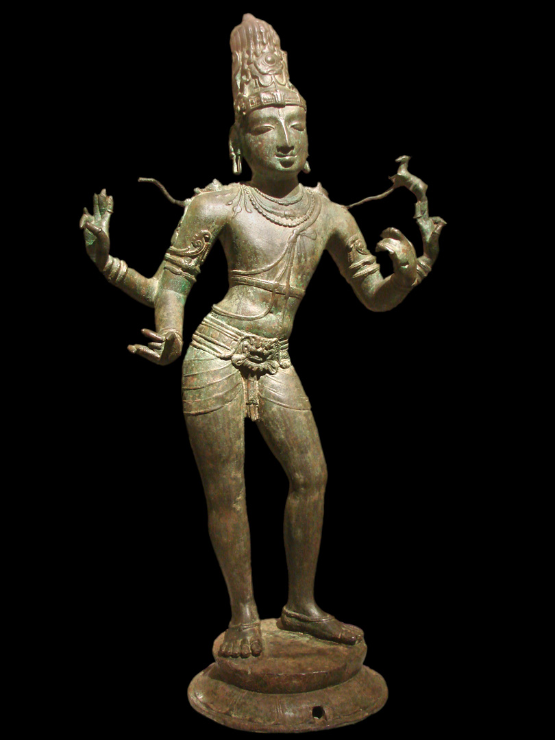 Shiva Vinadharadaksinamurti Maître de la musique Tamil Nadu Epoque cola, XIè siècle Bronze